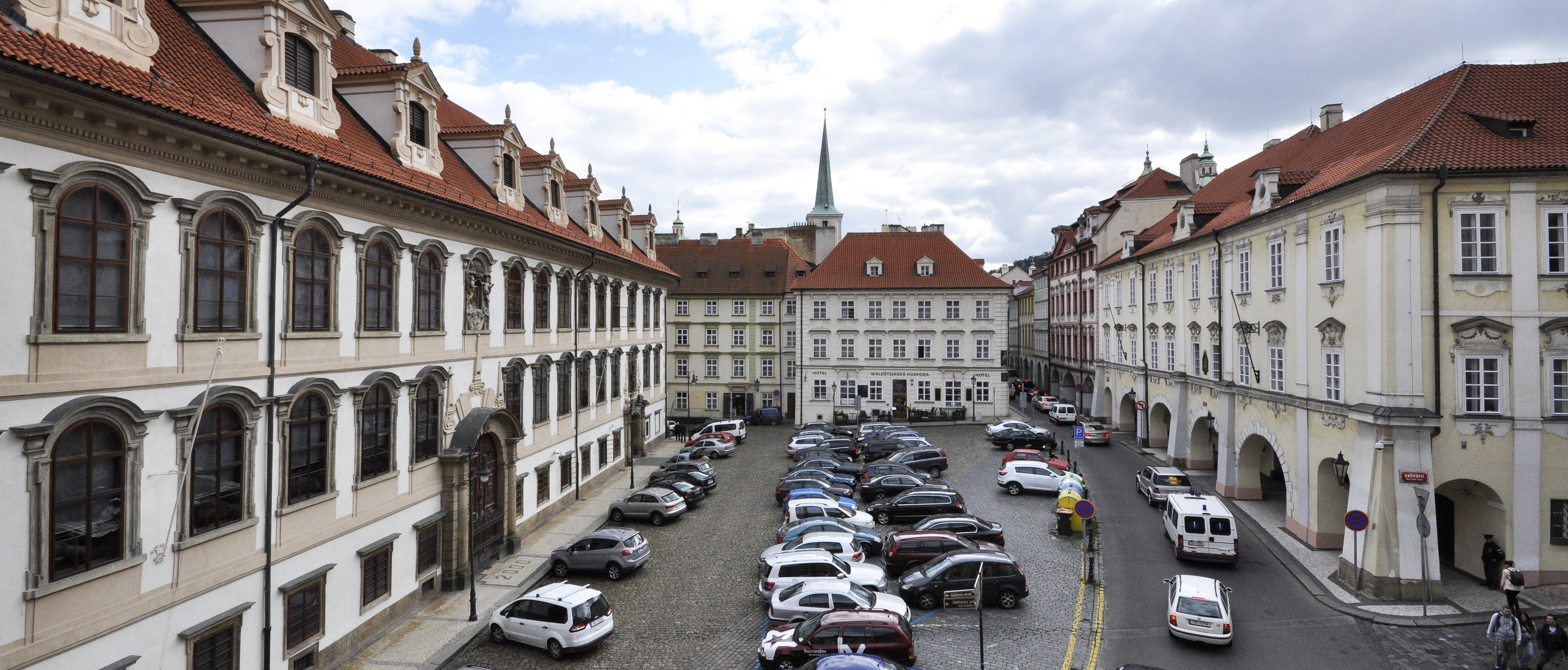 Pohled na jižní část Valdštejnského náměstí v Praze. Dům U tří čápů, Praha 1-Malá Strana, Valdštejnské náměstí 522/7, Malá Strana.